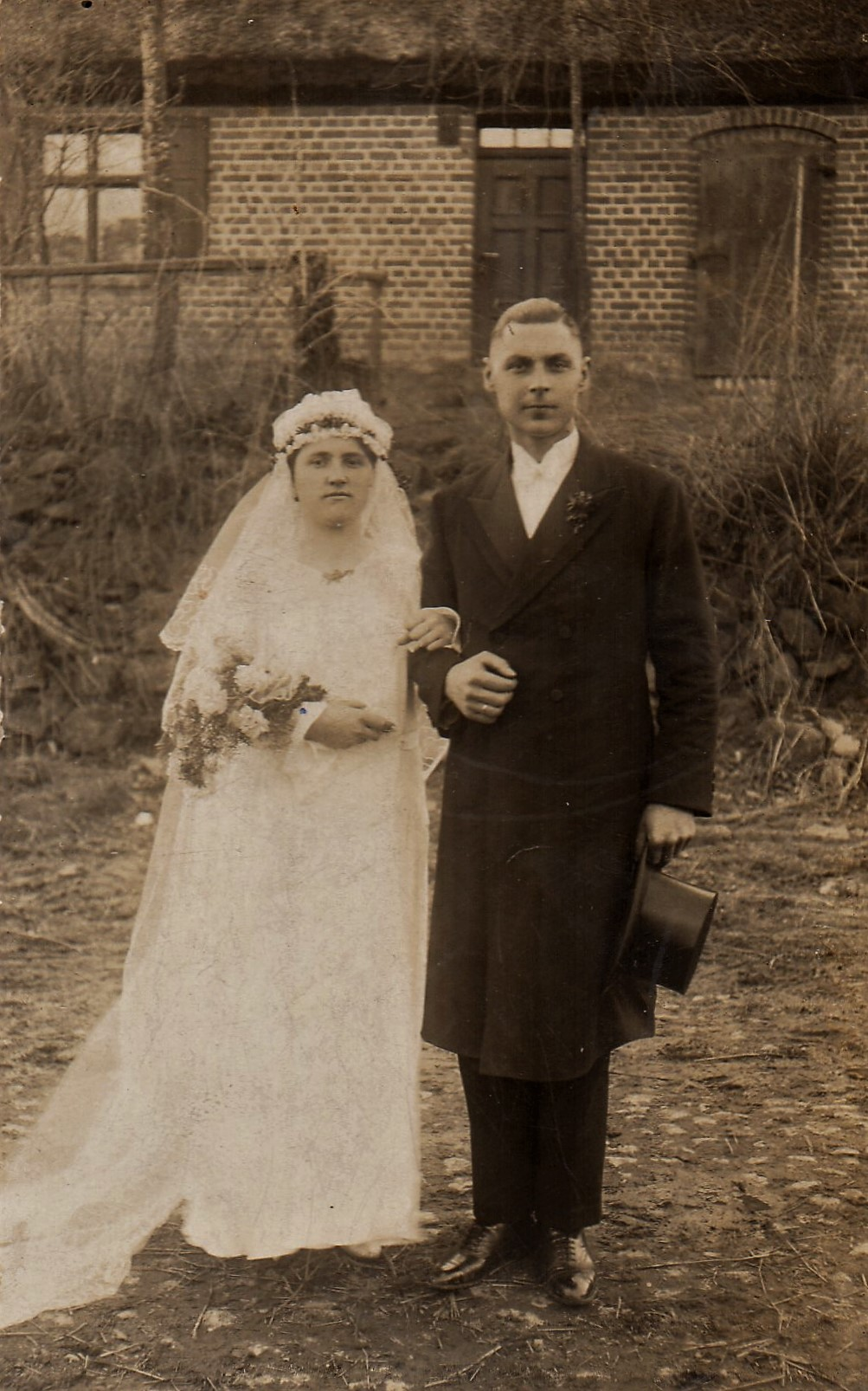 Kępa (Kappe), Bauernhochzeit (1936)